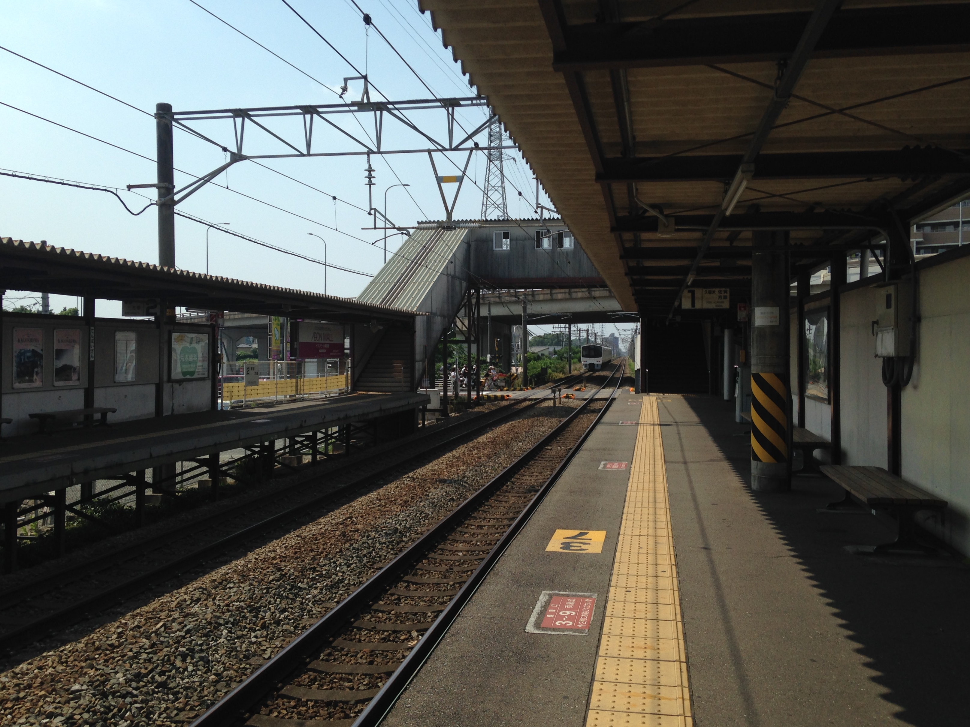 天拝山駅のホーム(二日市方面)